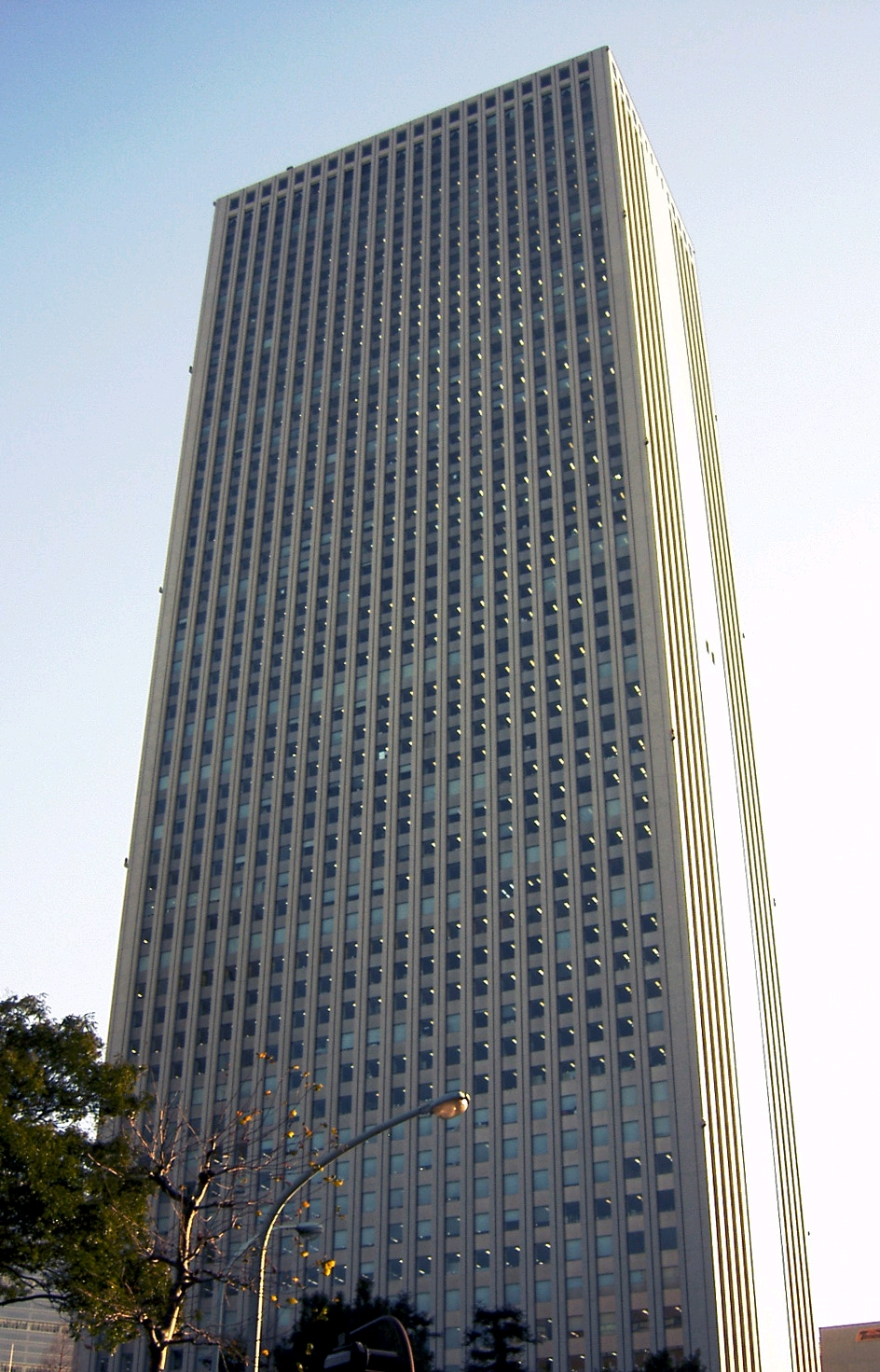 Sunshine_60_Ikebukuro_Tokyo Japan